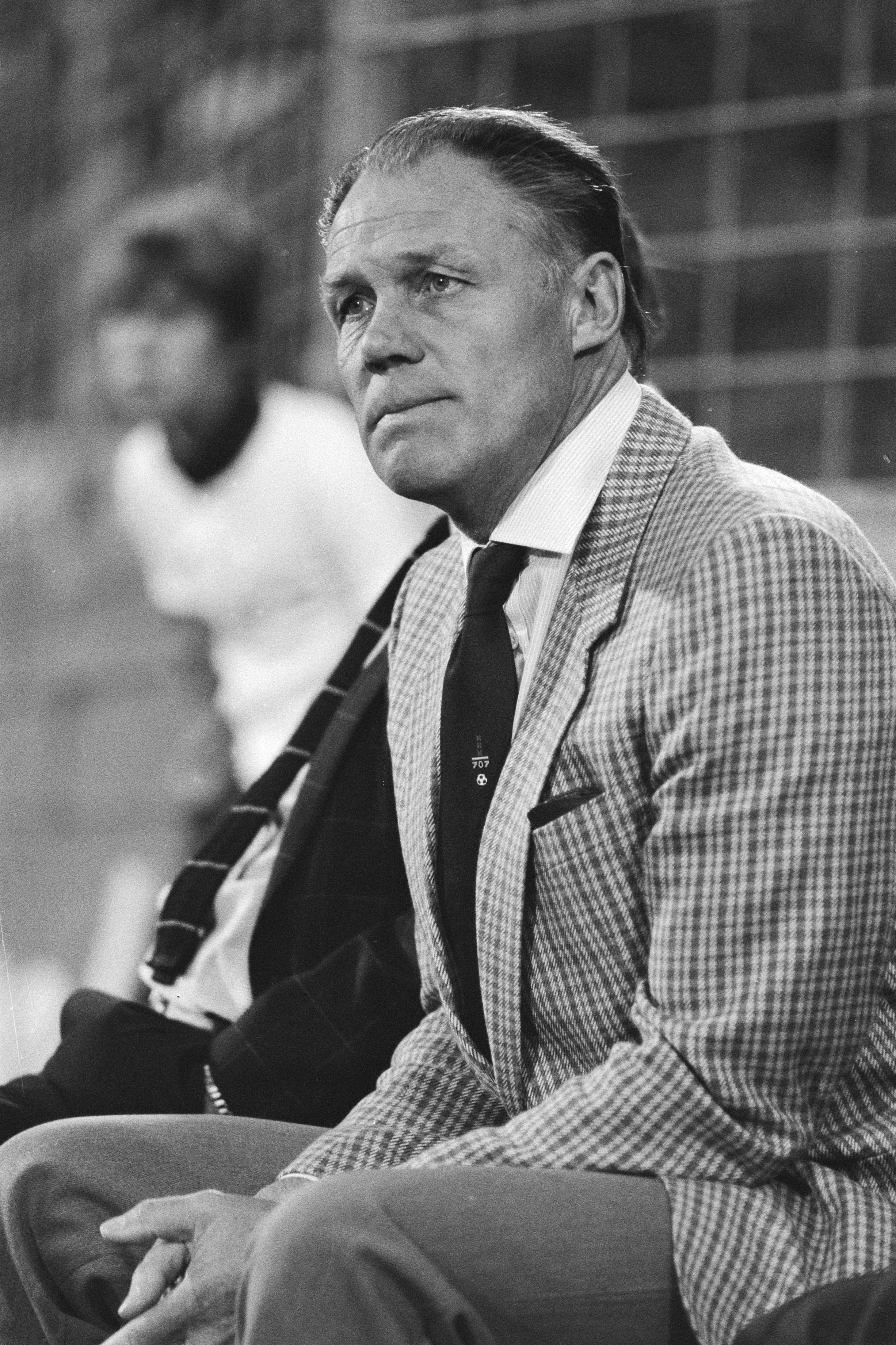 Collectie / Archief : Fotocollectie Anefo Reportage / Serie : [ onbekend ] Beschrijving : Amsterdam 707 toernooi , AZ 67 tegen FC Koln ; FC Koln trainer Rinus Michels , koppen Datum : 13 augustus 1982 Locatie : Amsterdam, Noord-Holland Trefwoorden : sport, trainers, voetbal Persoonsnaam : Fc Koln, Michels, Rinus Fotograaf : Croes, Rob C. / Anefo Auteursrechthebbende : Nationaal Archief Materiaalsoort : Negatief (zwart/wit) Nummer archiefinventaris : bekijk toegang 2.24.01.05 Bestanddeelnummer : 932-2768